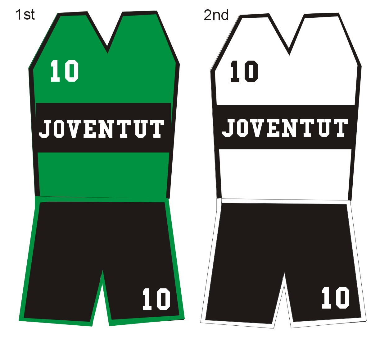 Uniforme del Club Joventut de Badalona Dibujo realizado por SergiL